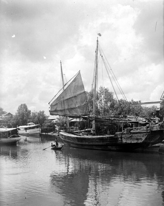 Repronegatief. Ataphaven met Chinese jonk, Belawan